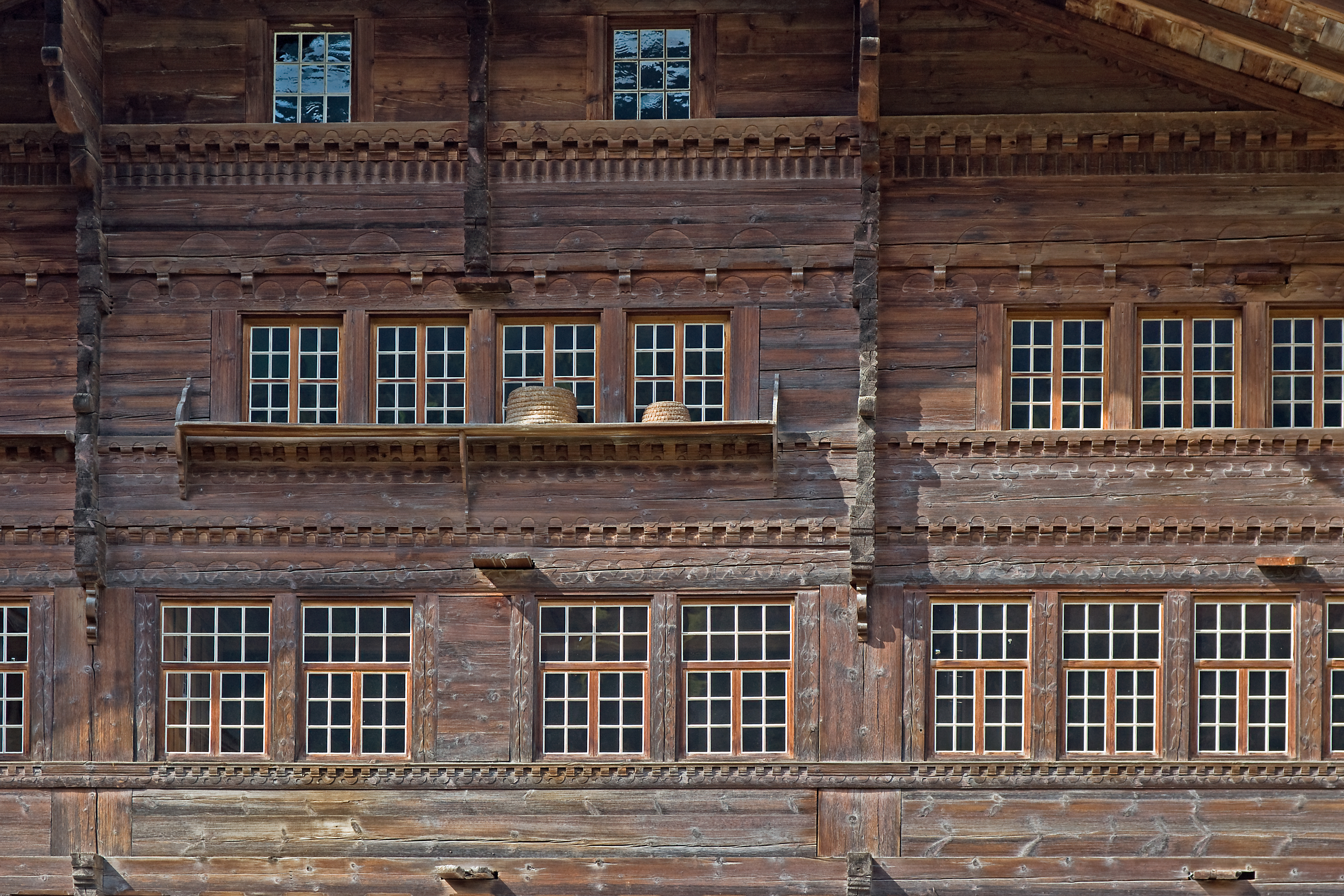 Erlenbach im Simmental, Agensteinhaus, Fassadendetail.